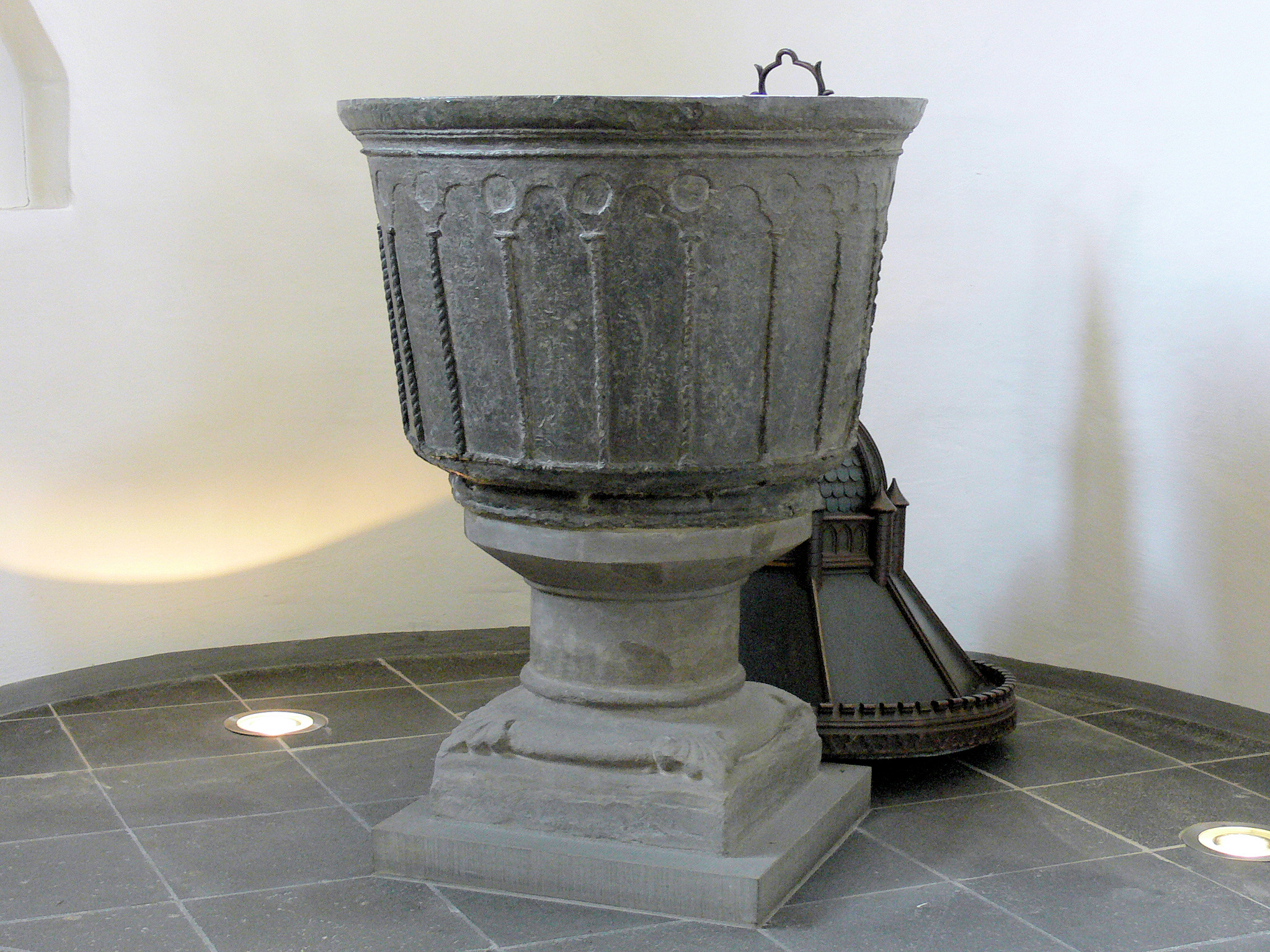 Wipperfürther Pfarrkirche St. Nikolaus Taufbecken